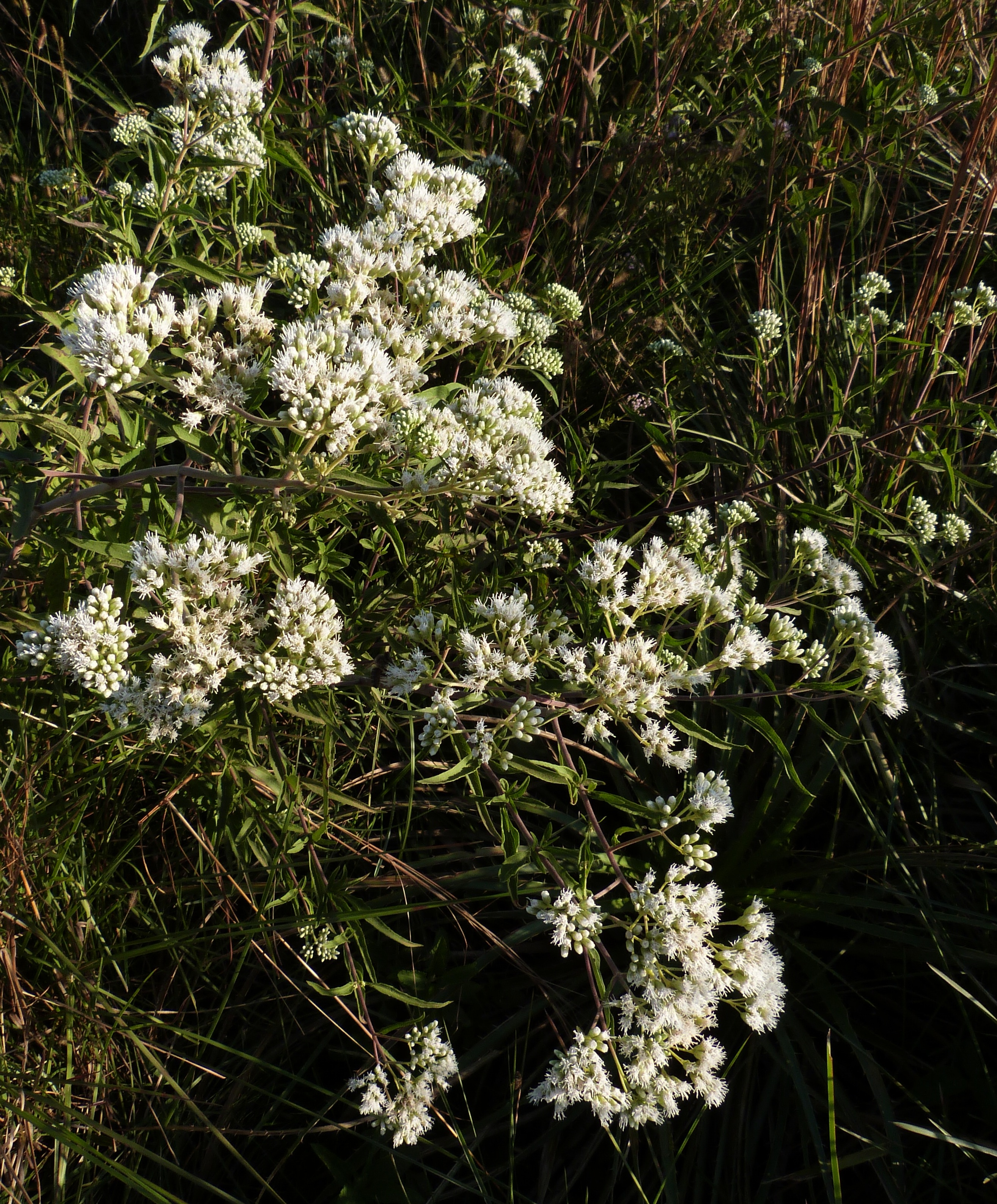 Austroeupatorium inulifolium, llamado vulgarmente chilca de olor o mariposera, en un pastizal nativo con paja colorada (Andropogon lateralis) en Chajarí, Dpto. Federación, Entre Ríos, AR.